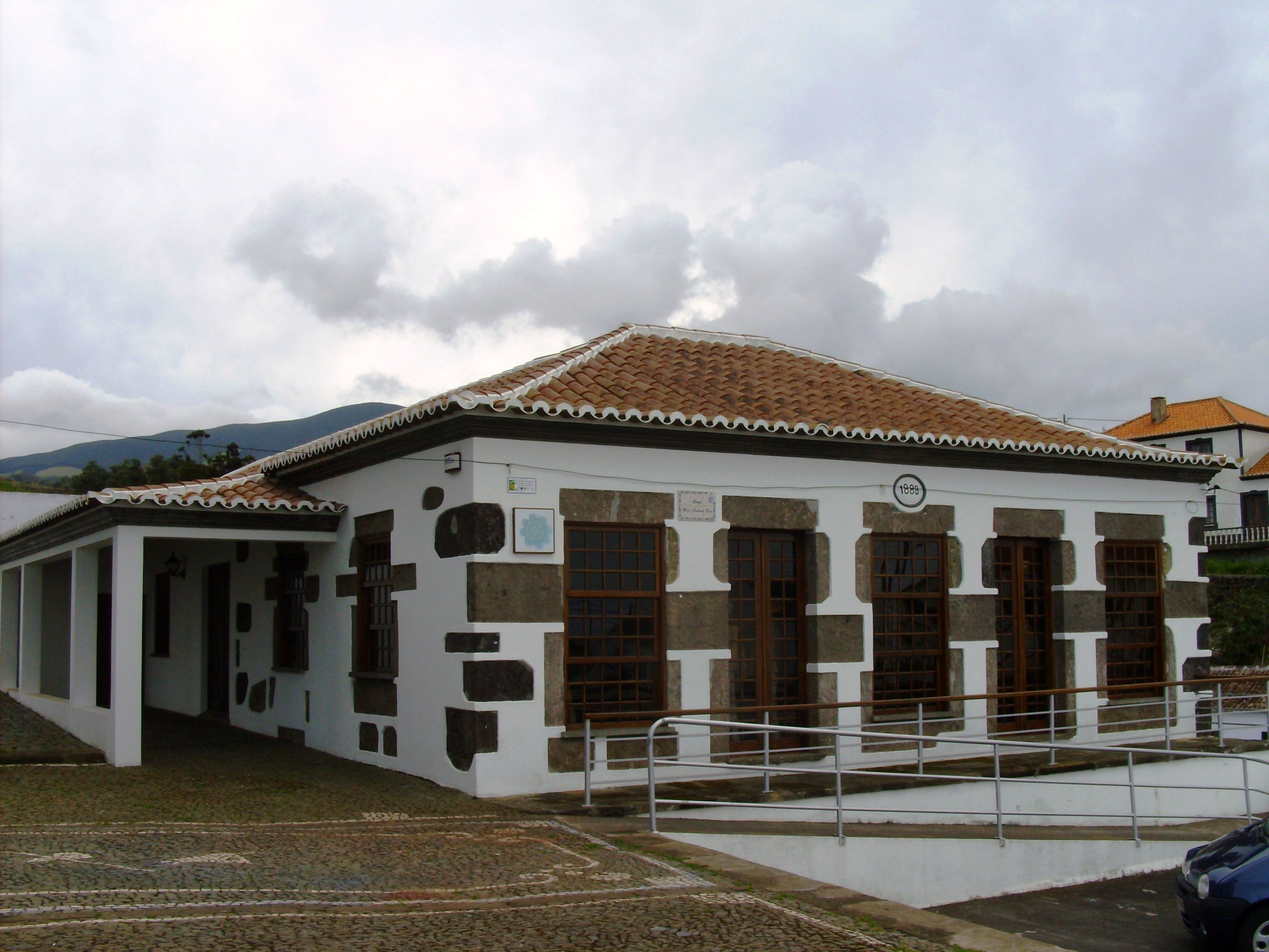 Museu Etnográfico dos Altares, freguesia dos Altares, concelho de Angra do Heroísmo, ilha Terceira, Região Autónoma dos Açores, Portugal.